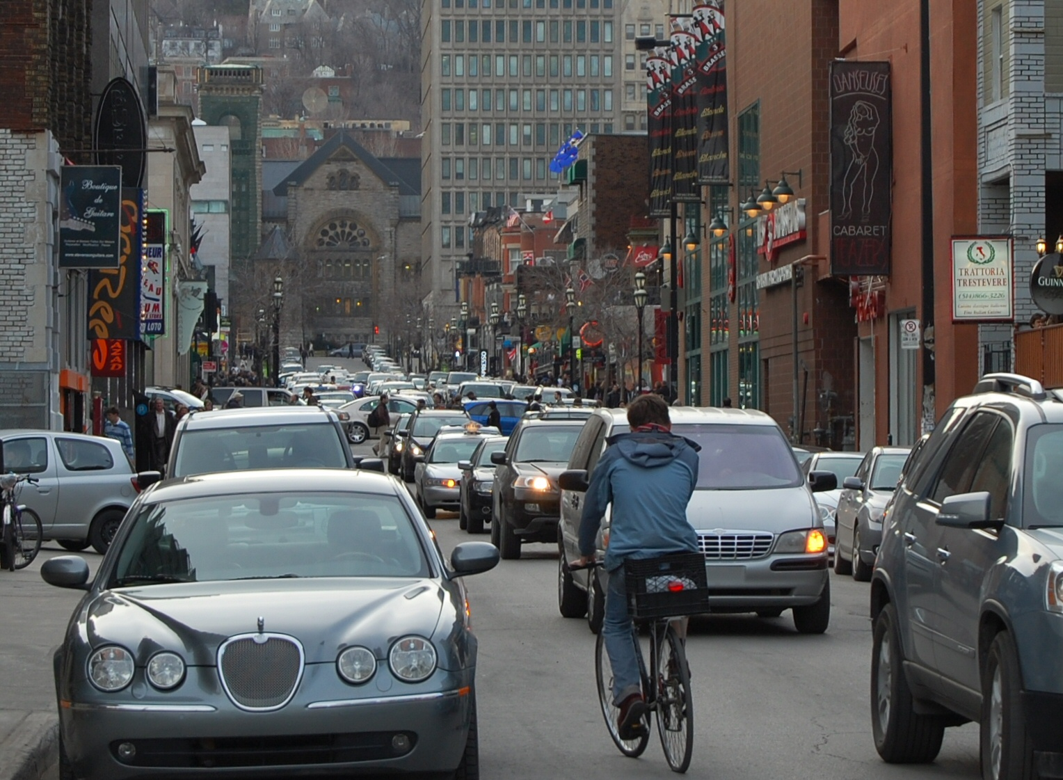 Rue Crescent, Montréal